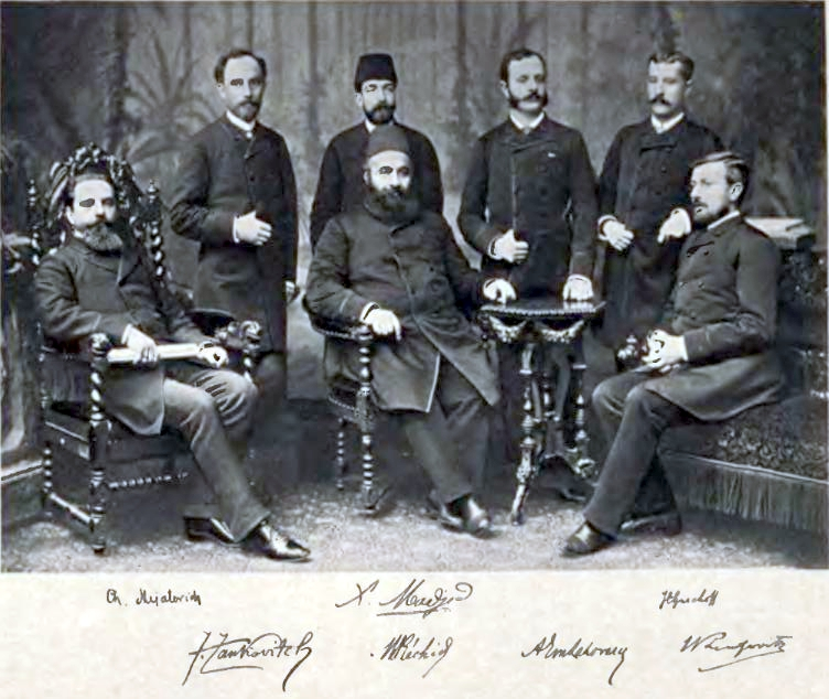 Firmantes del Tratado de Bucarest (1886).